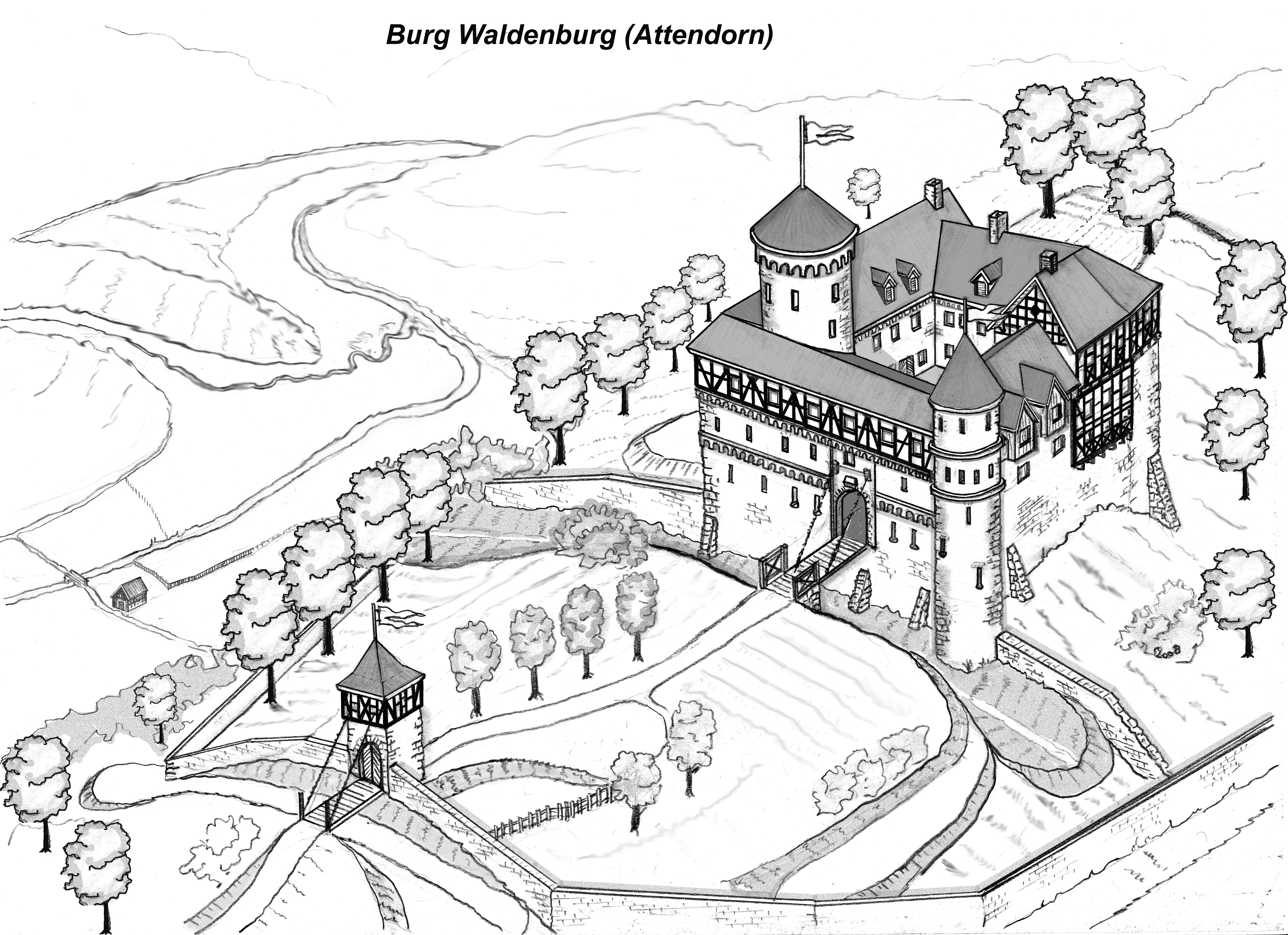 Rekonstruktion der Burg Waldenburg bei Attendorn, nach Artikel Heimatstimmen für den Kreis Olpe 59/89